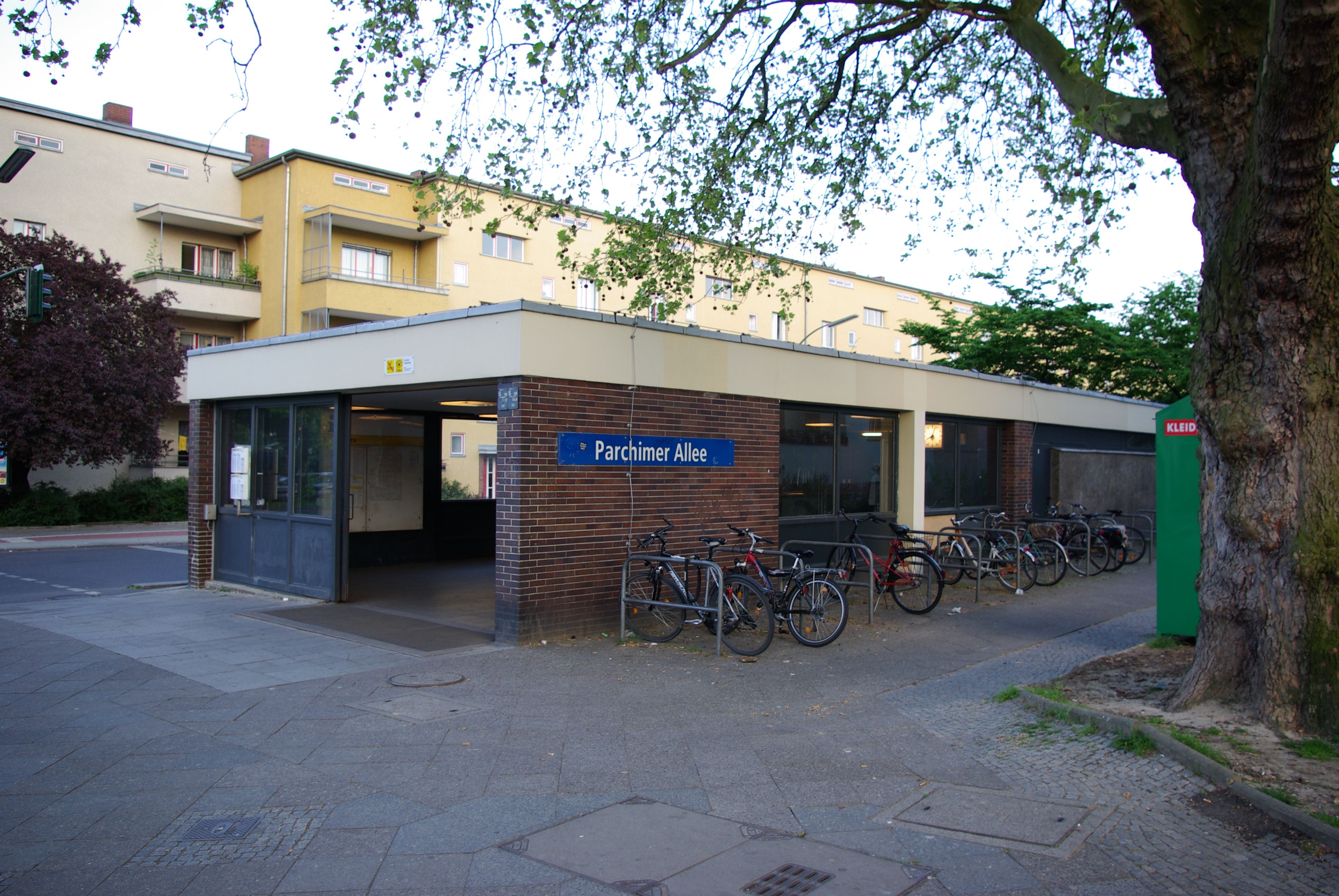 Berlin, U-Bahnhof Parchimer Allee, die Außenanschicht des nördlichen Ausganges